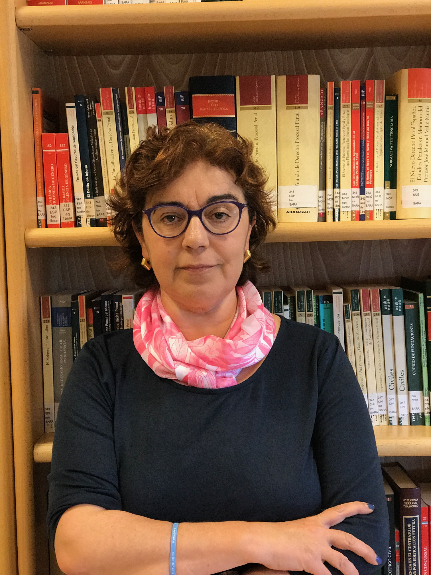 Francisca Hornos Mata. Directora del Museo de Jaén.